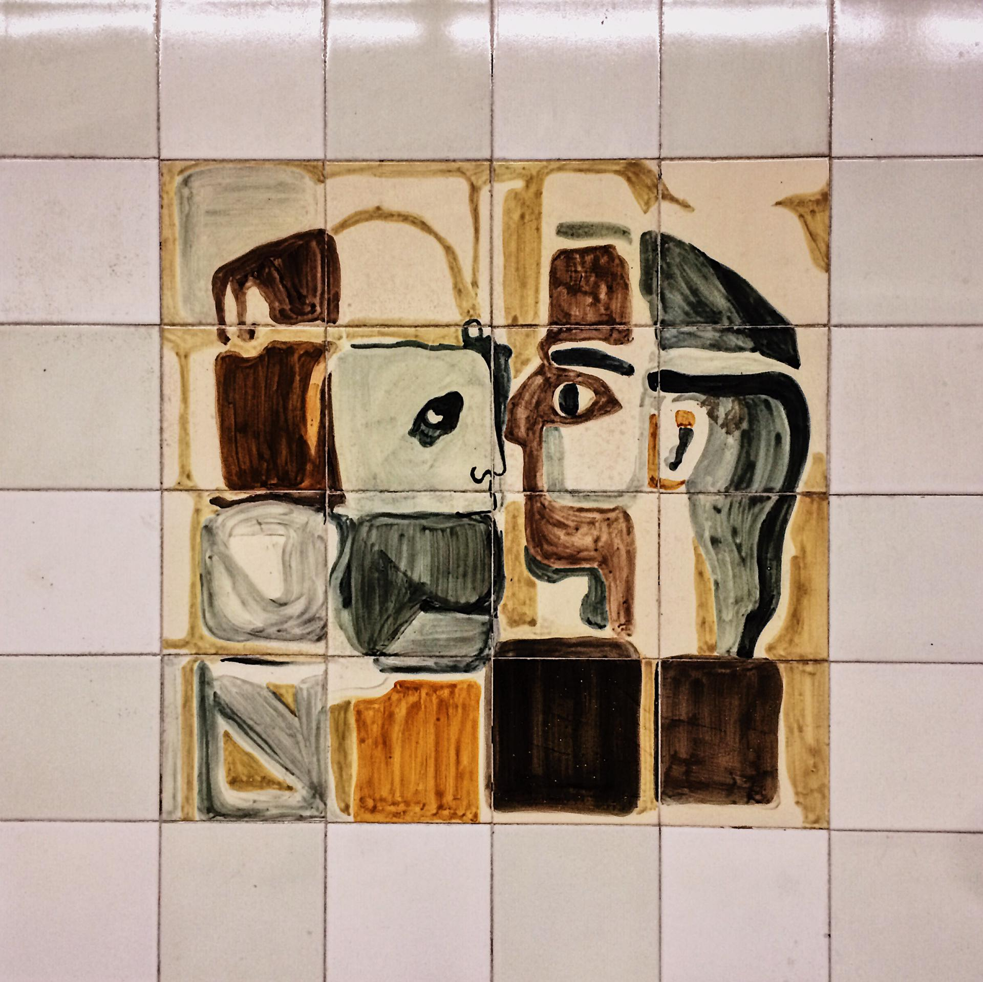 Pequeno pormenor de painel azulejar, presente na estação Cidade Universitária do Metropolitano de Lisboa da autoria de Maria Helena Vieira da Silva, datado de 1988, fotografia do dia 11 de Junho de 2019, por Diogo Baptista